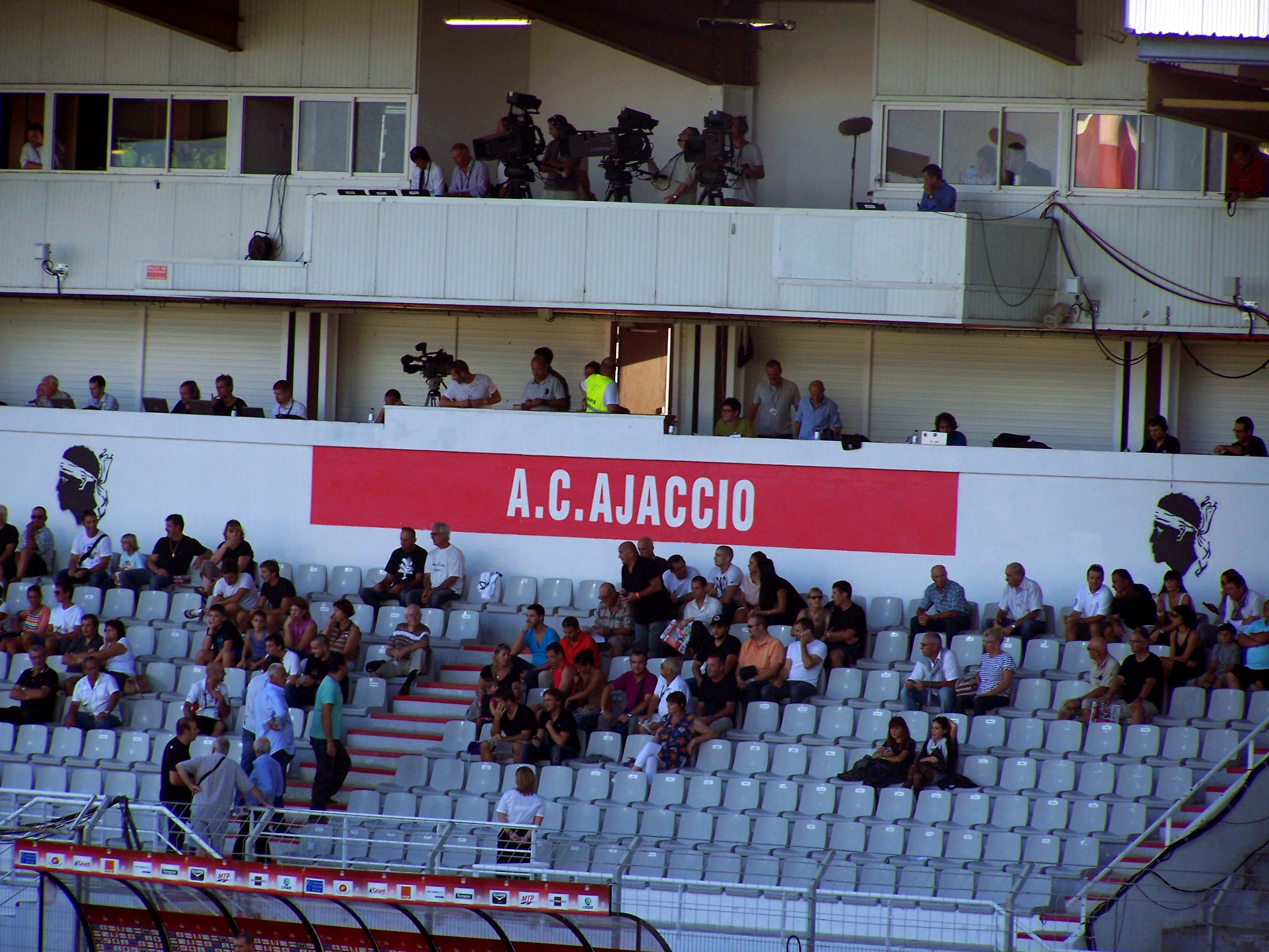 tribune officielle